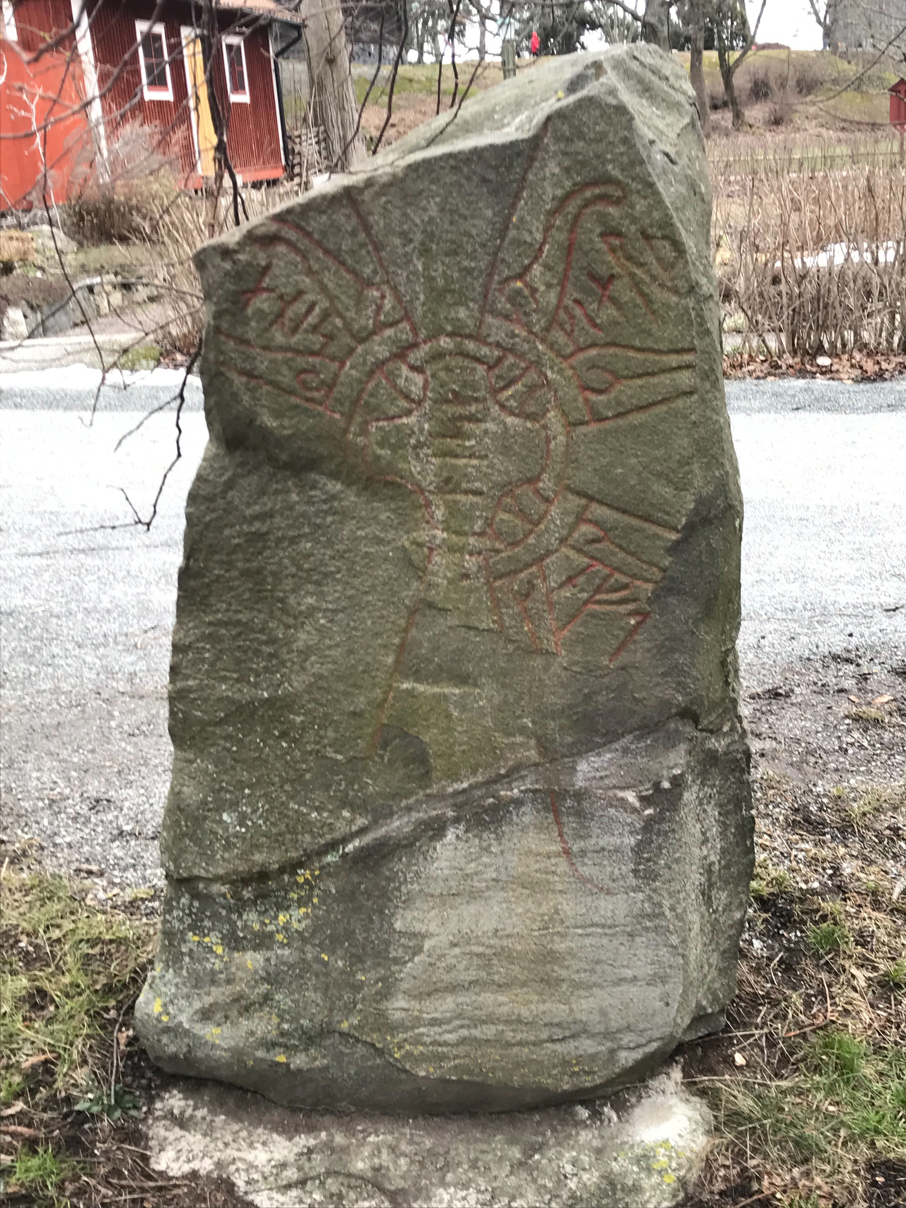 Baksidan av Lingastenen Skansen 2019